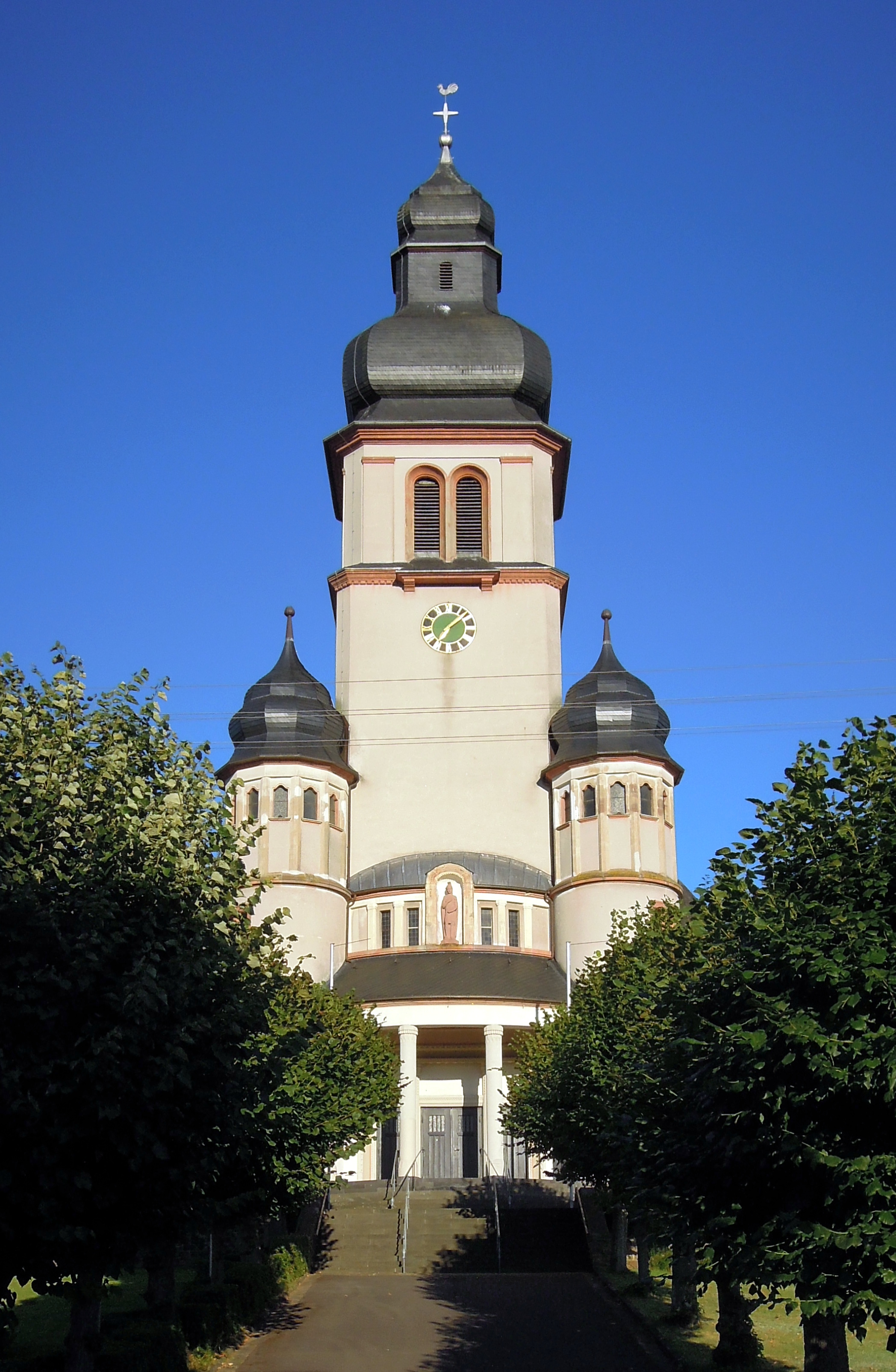 Kapelle der hl. Katharina